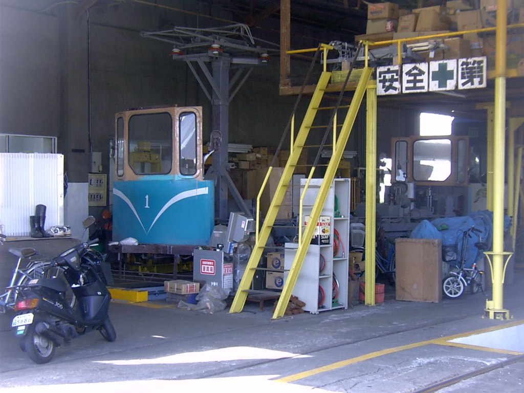 鹿児島市電花1